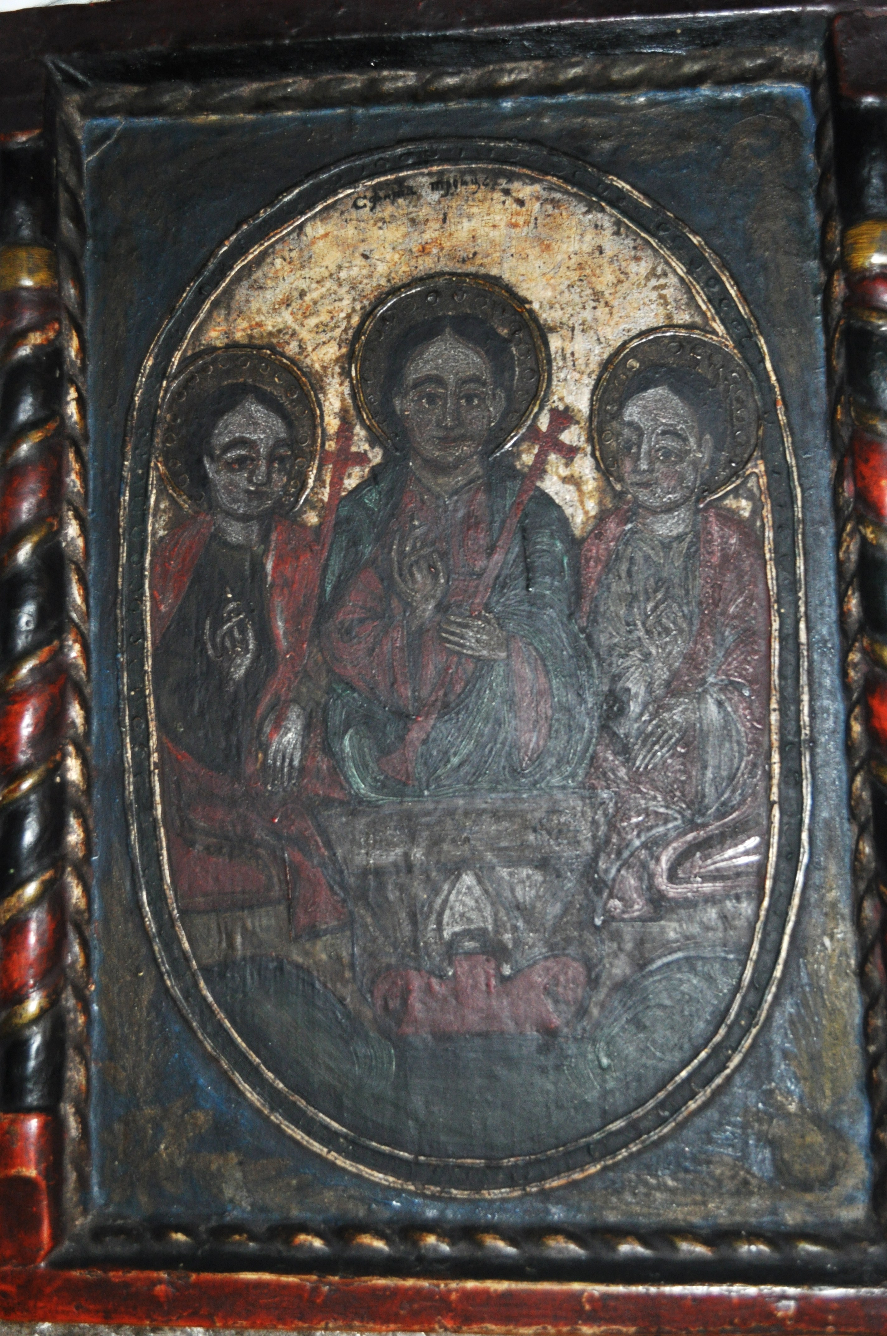 Biserica de lemn din Nadășu, județul Cluj